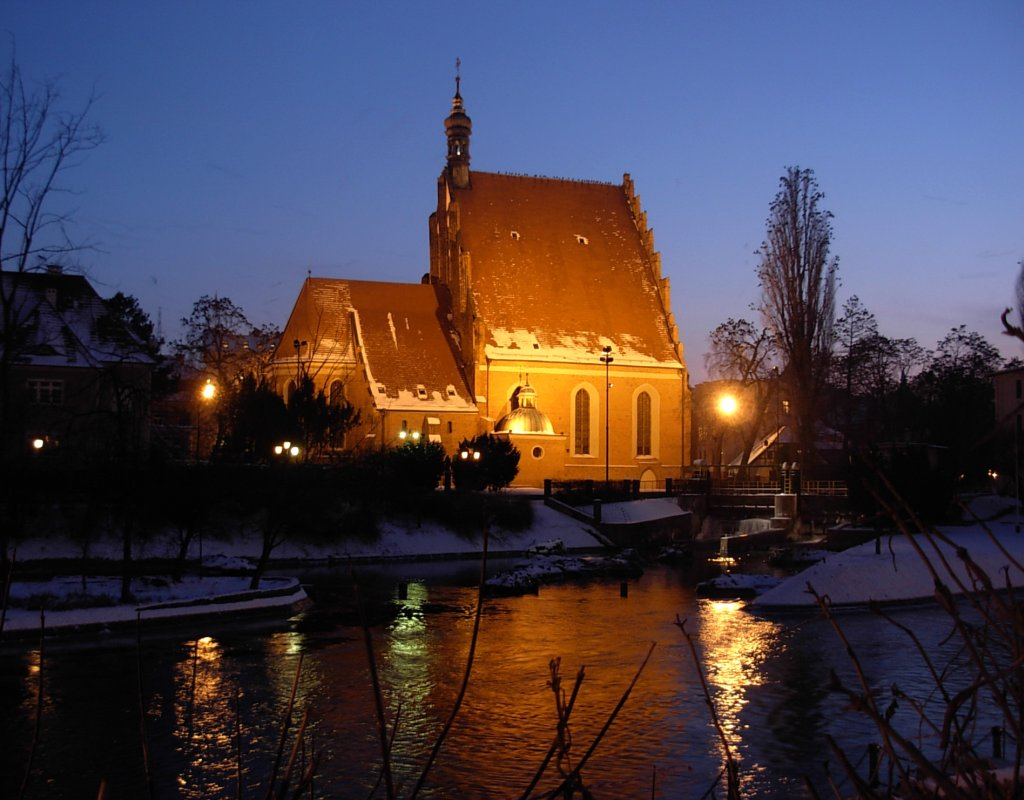 Katedra bydgoska pw. św. Marcina i Mikołaja